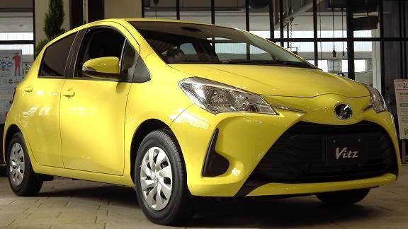 トヨタ ヴィッツ F（1.3L) ルミナスイエロー 5B5